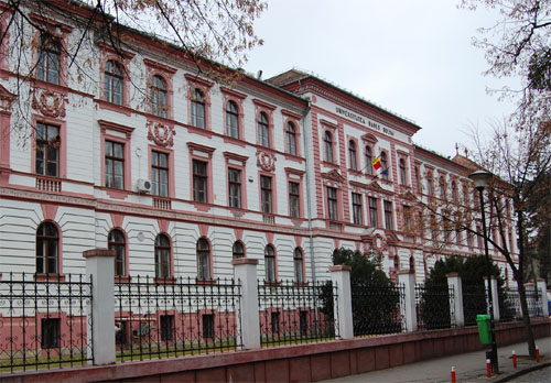 Bolyai TE rektori hivatala Kolozsvárott. Ma a kémia tanszék épülete